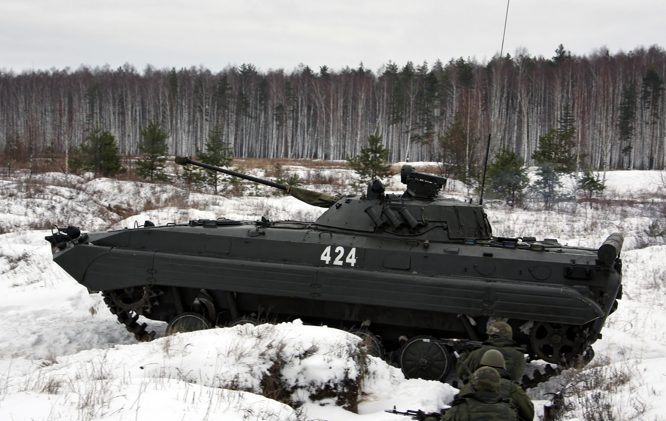 Переход в наступление мотострелкового отделения при поддержке БМП-2